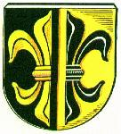 Wappen der ehemaligen Gemeinde Blandorf-Wichte (Niedersachsen, Deutschland). Der Ort ist heute ein Teil der Gemeinde Hage